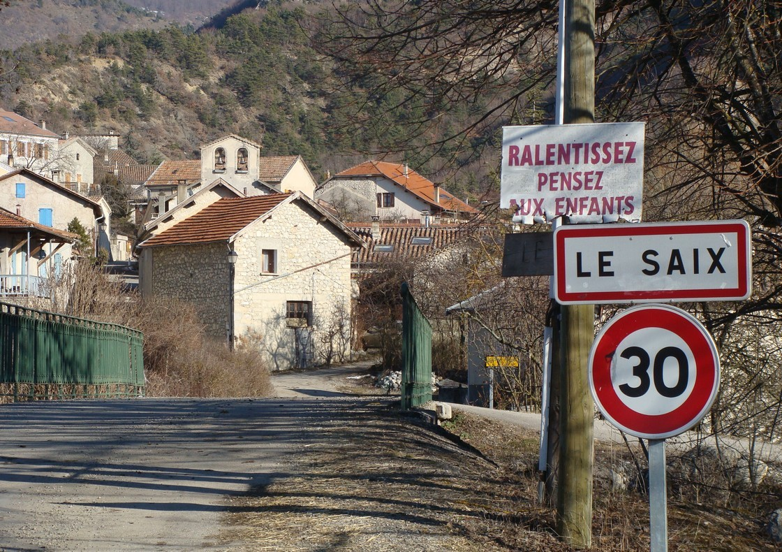 Le Saix (Hautes-Alpes), l'entrée du village sur la D49, venant de Chabestan. Vue vers l'Est. Le pont enjambe le torrent du Poutelier, venant du nord. Au milieu du village on voit le haut du mur de façade de l'église Saint-Vincent, avec ses deux cloches. En arrière-plan, les contreforts du Pibonnet (1267 m d'altitude, hors photo) surplombant la vallée du ruisseau de la Garenne.